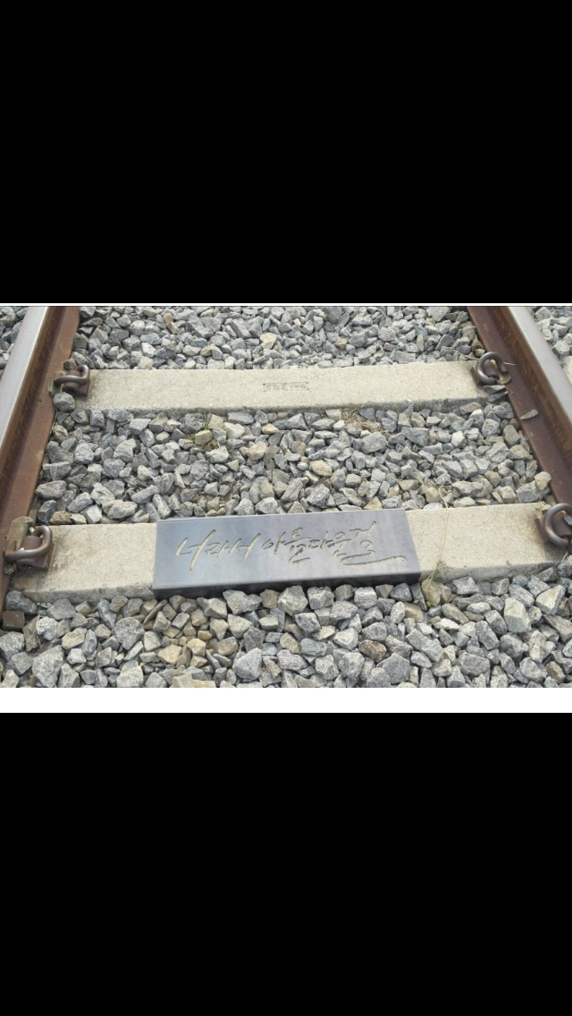 철길 블록에 한마디 글귀가 적혀있다.